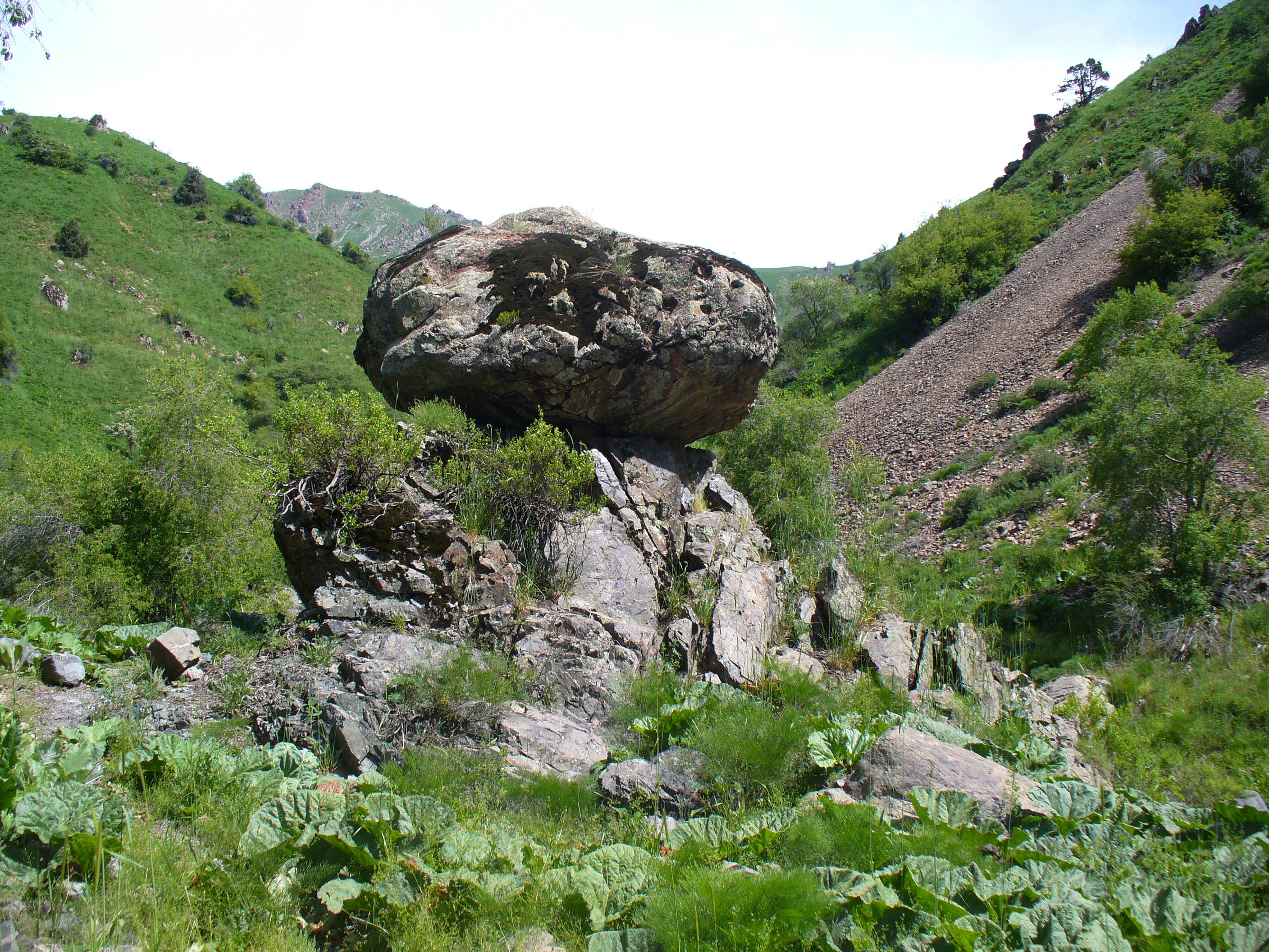 "Каменный гриб" в верховьях Кызылсу. Бостанлыкский район, Ташкентская область, Республика Узбекистан.